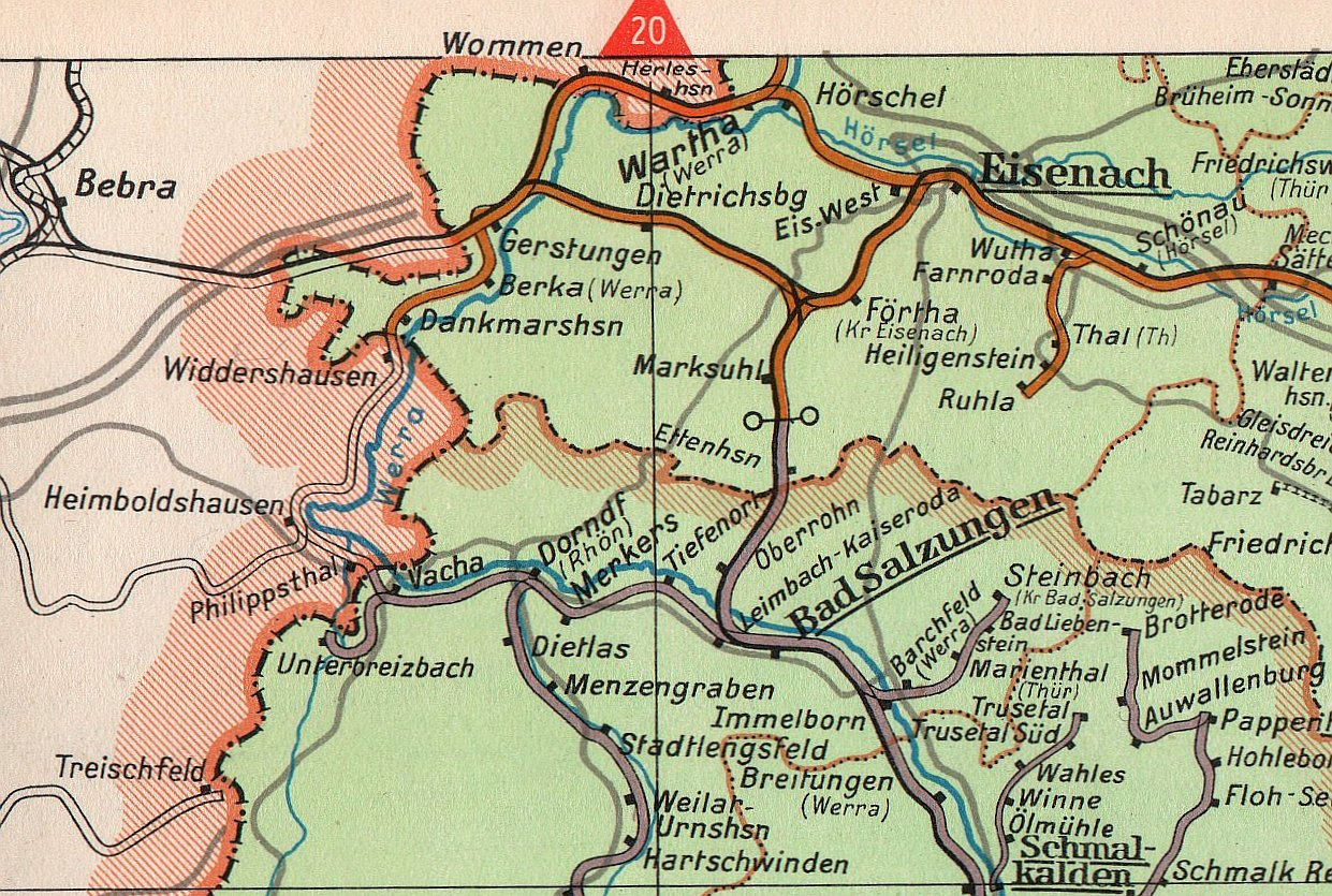 Ausschnitt Seite 26 - Thüringer Bahn West